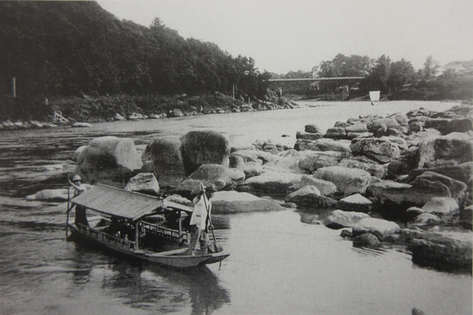 勘八峡（愛知県豊田市）。1921年頃撮影。